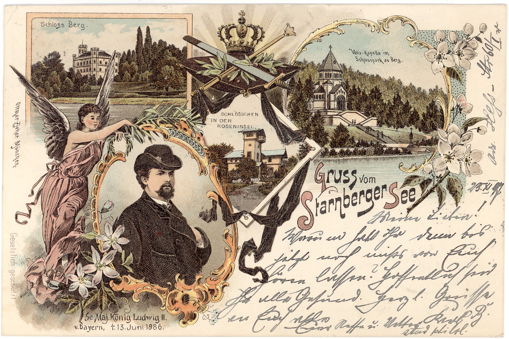 Ansichtskarte: Gruss vom Starnberger See.Text: „Meine Lieben! Warum habt Ihr denn bis jetzt noch nichts von Euch hören lassen? Hoffentlich seid Ihr alle gesund. Herzl. Grüsse an Euch alle Euer Neffe und Vetter Karl“